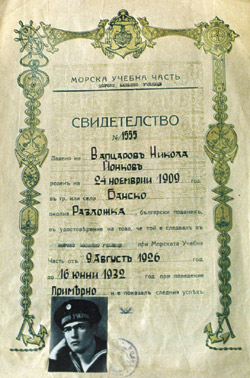 Certificate from Bulgarian Naval Academy